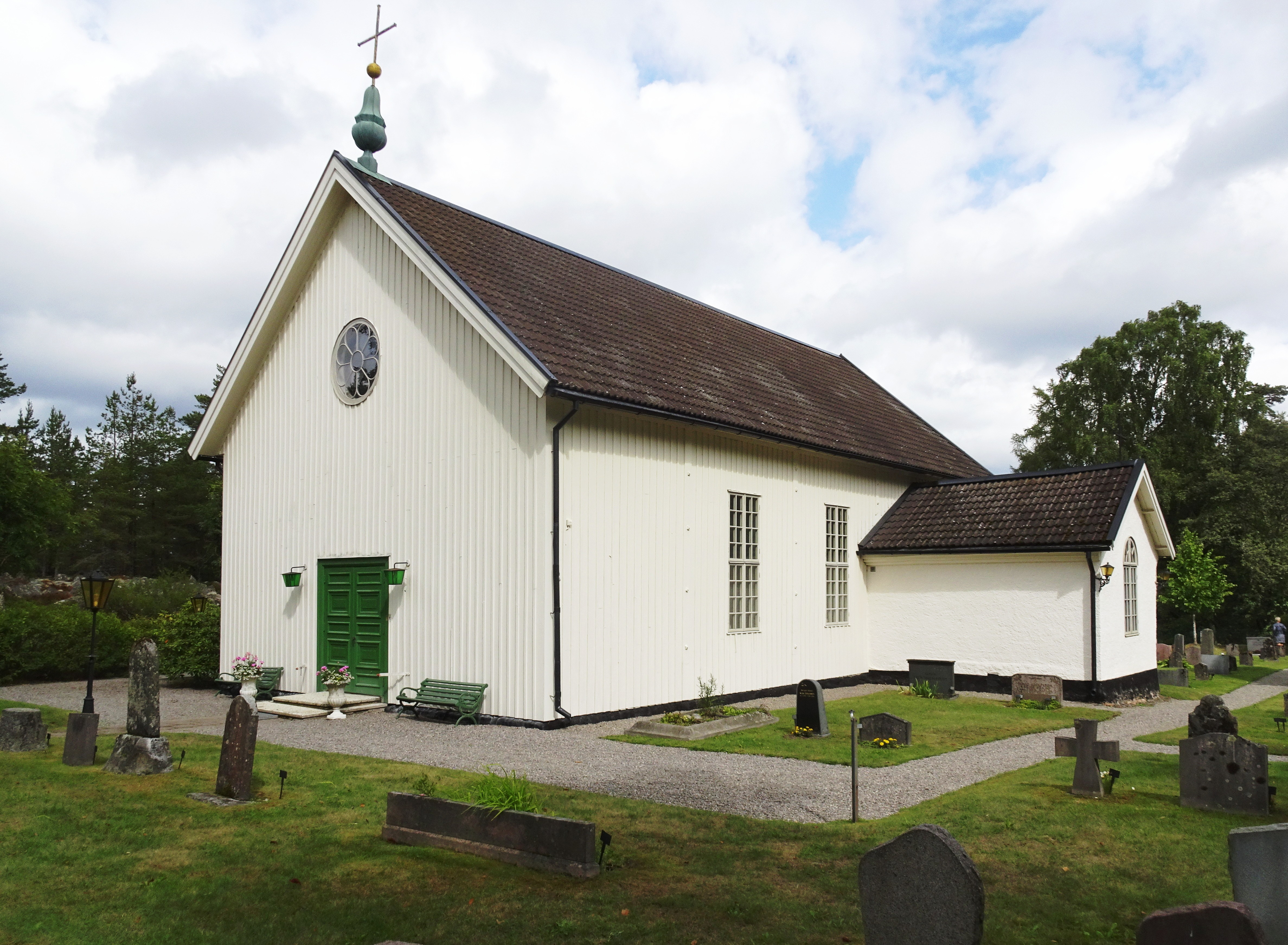 Muskö kyrka